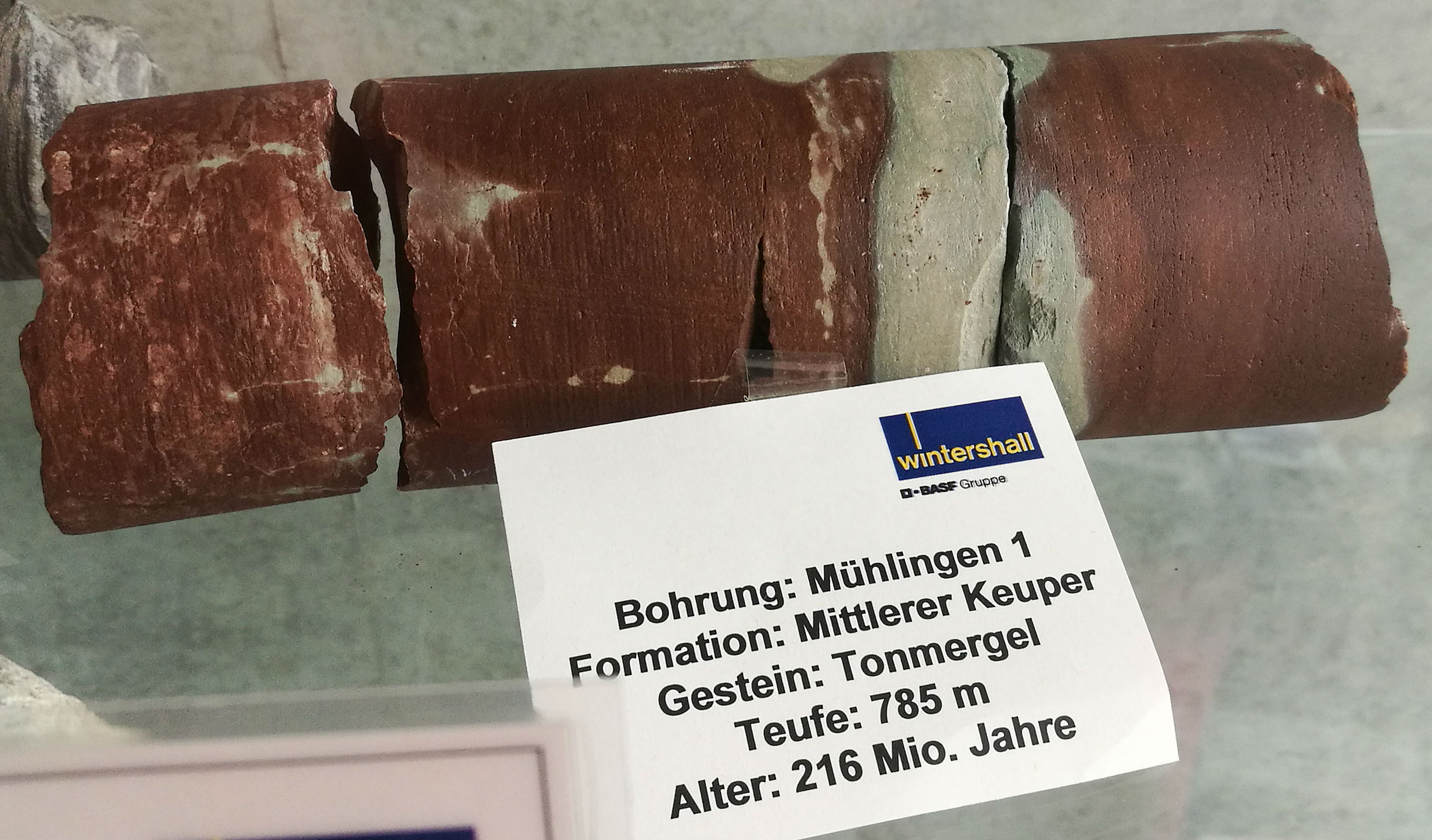 Deutschland (D) - Baden-Württemberg (BW) - Landkreis Konstanz (KN) - Mühlingen: Bohrkern der Aufschlussbohrung "Mühlingen 1", Herbst 1966